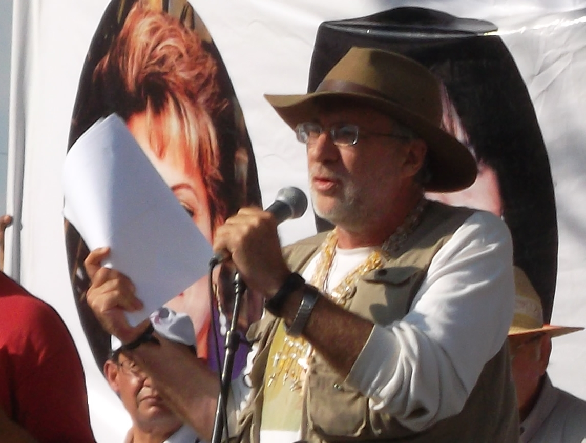 Javier Sicilia dando su discurso después de la marcha por la paz de Cuernavaca a la Ciudad de México el 8 de mayo de 2011.